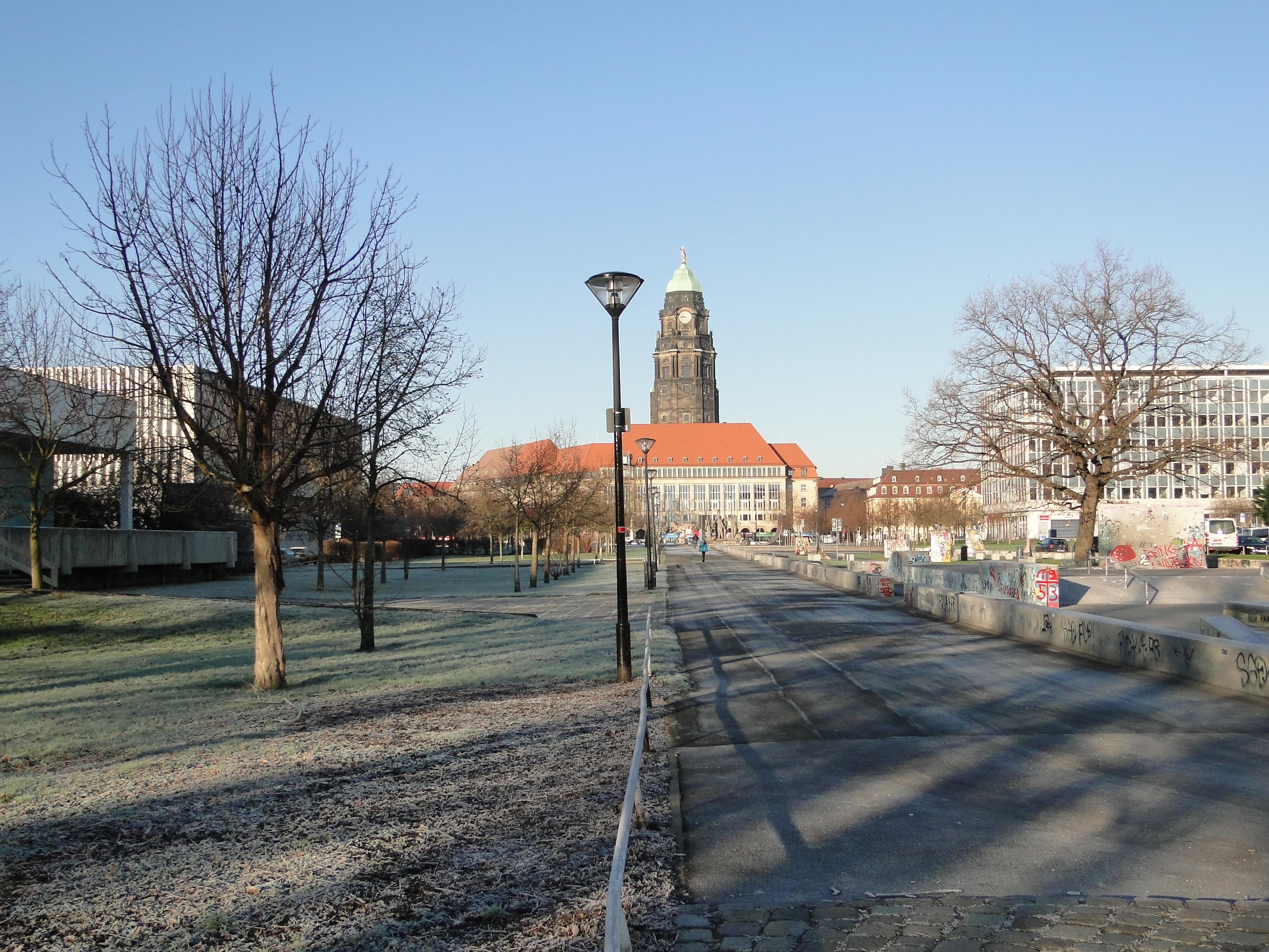 Lingnerallee in Dresden mit Blick zum Dresdner Rathaus, Standort der alten Johanniskirche und des Johanniskirchhofs